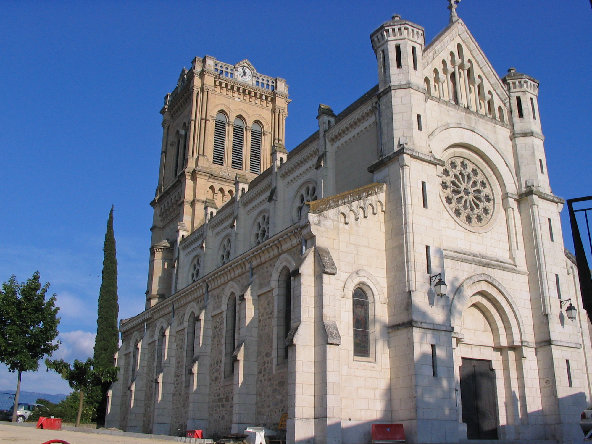 Montelier 26120 eglise catholique.JPG